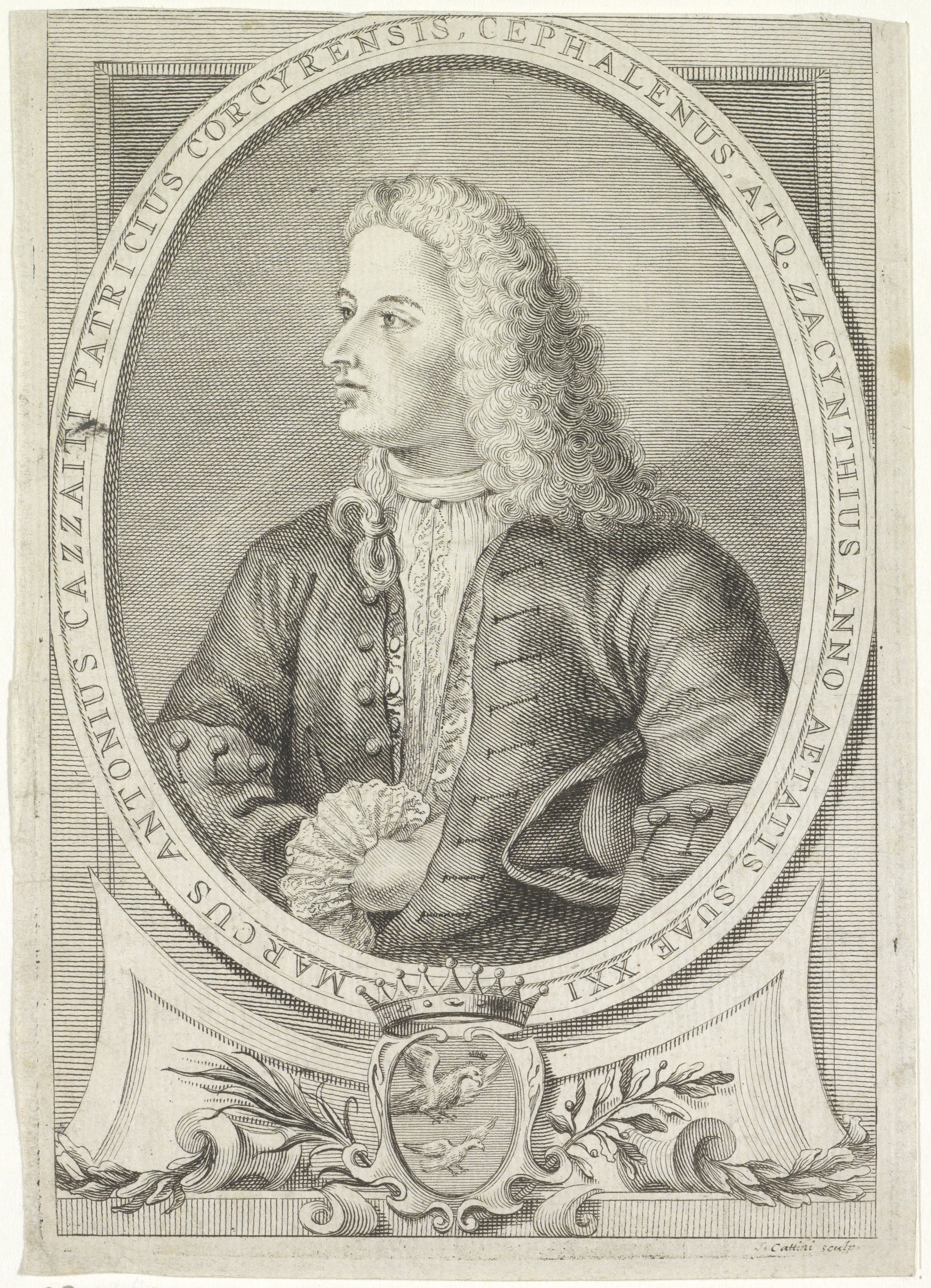 IdentificatieTitel(s): Portret van Markos Antonios KatsaitisObjecttype: prent Objectnummer: RP-P-1909-4860Opschriften / Merken: verzamelaarsmerk, verso, gestempeld: Lugt 2228VervaardigingVervaardiger: prentmaker: Giovanni Cattini (vermeld op object)Plaats vervaardiging: ItaliëDatering: 1735 - 1800Fysieke kenmerken: etsMateriaal: papier Techniek: etsenAfmetingen: blad: h 156 mm (Binnen plaatrand afgesneden.) × b 110 mm (Binnen plaatrand afgesneden.)OnderwerpWat: historical personsWie: Markos Antonios KatsaitisVerwerving en rechtenVerwerving: aankoop 1905Copyright: Publiek domein